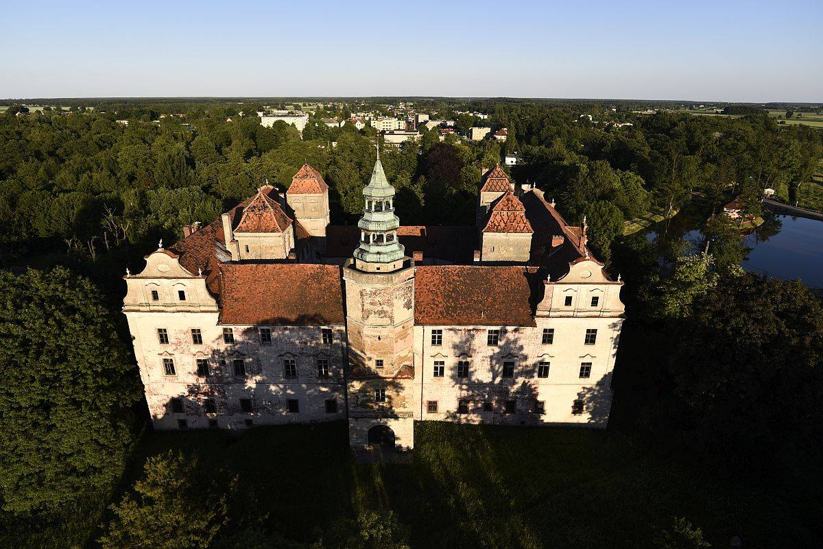 Zamek Niemodlin, widok z drona